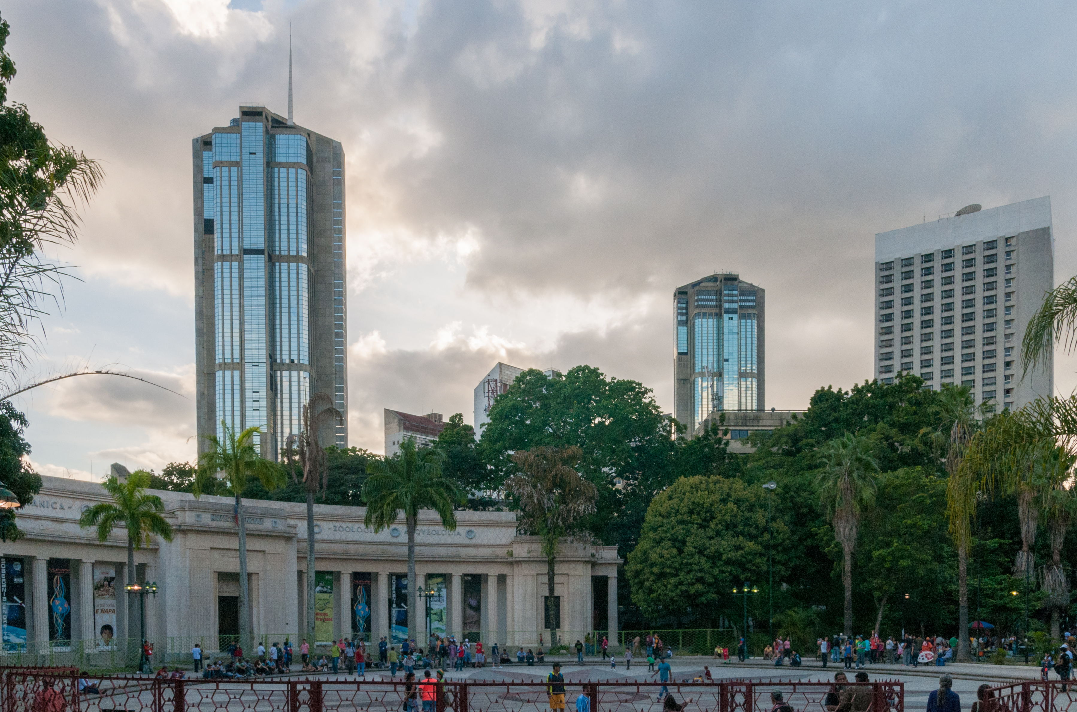 Torres de Parque Central en Bellas Artes